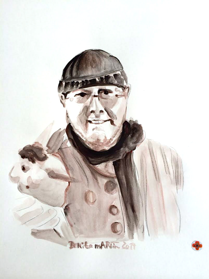 Acryl, Tempera, Graphit, Kohle auf Aquarellpapier, gemalt von Benita Martin, ADA Dimensionsmalerei®